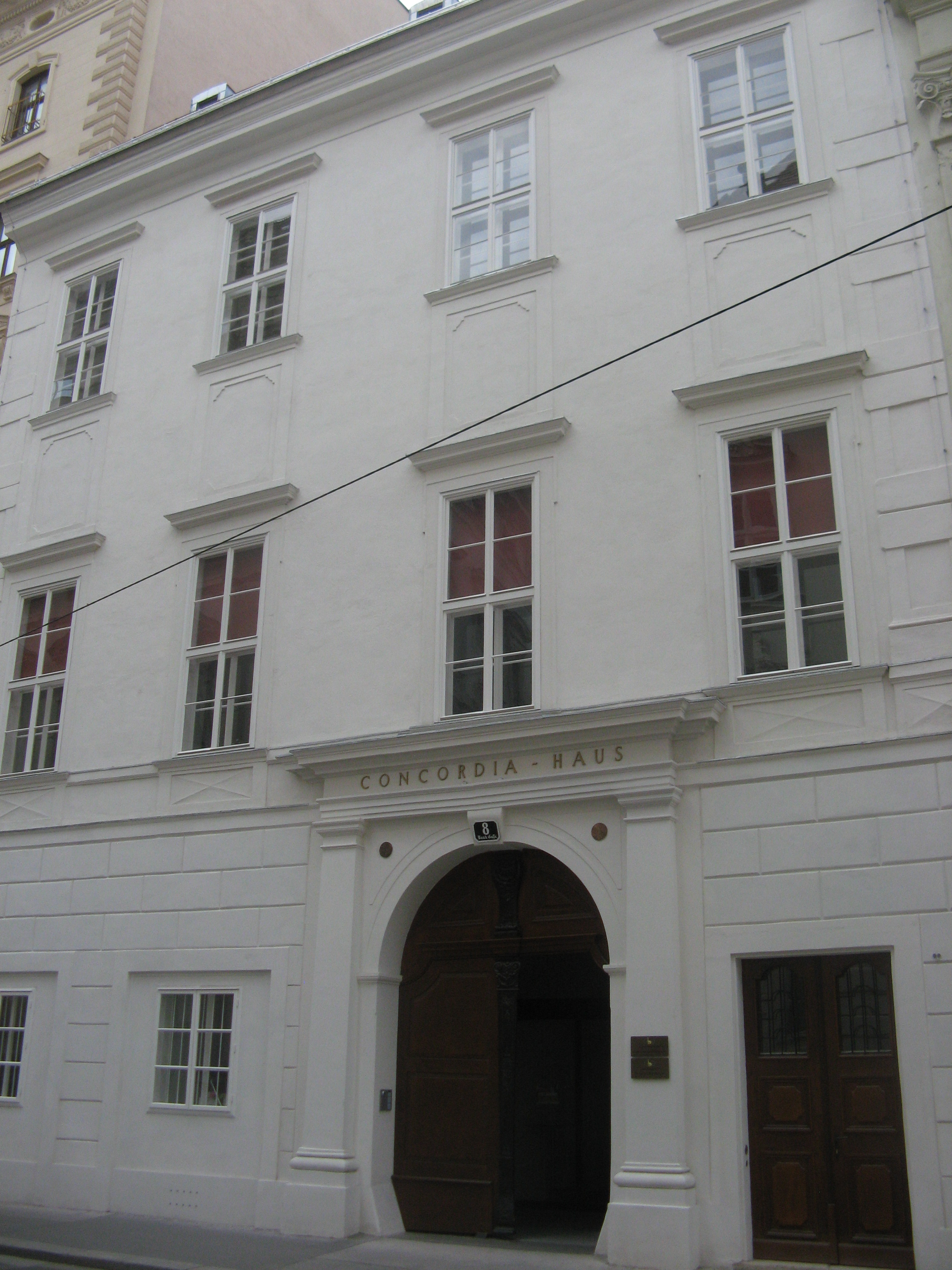 Concordia-Haus (um 1600), Bankgasse 8, Wien-Innere Stadt